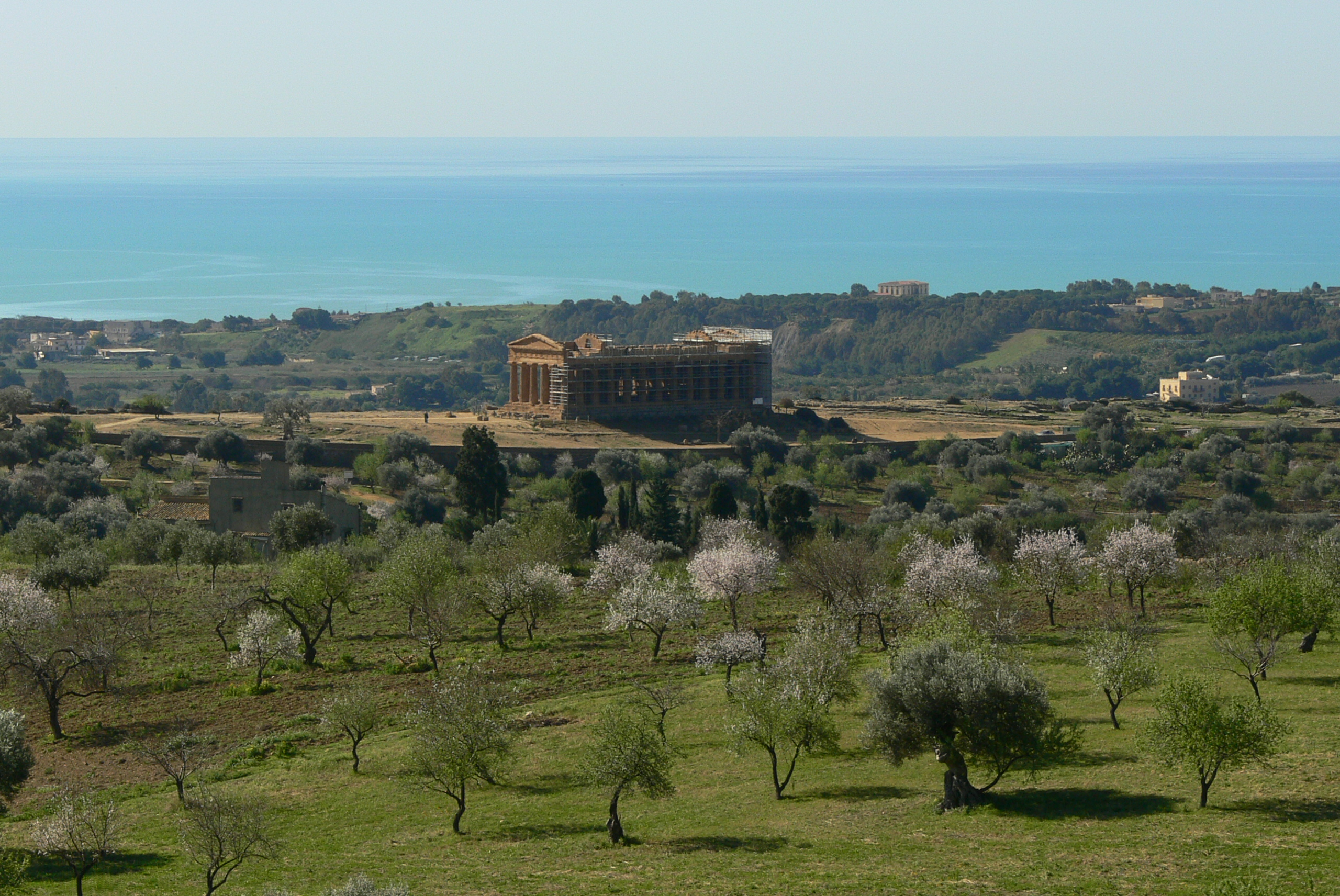 Agrigento